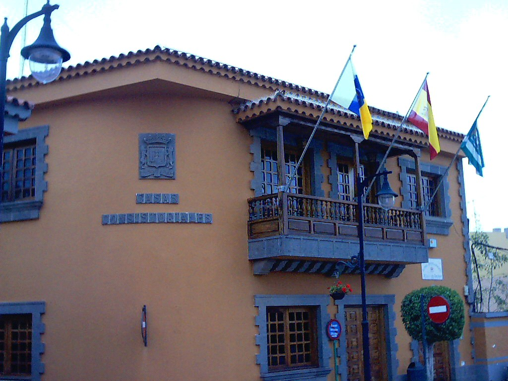 Vista frontal del Ayuntamiento de la Villa de Ingenio. Se encuentra en la misma Plaza de la Candelaria, justo frente a la Iglesia que da nombre a esta.